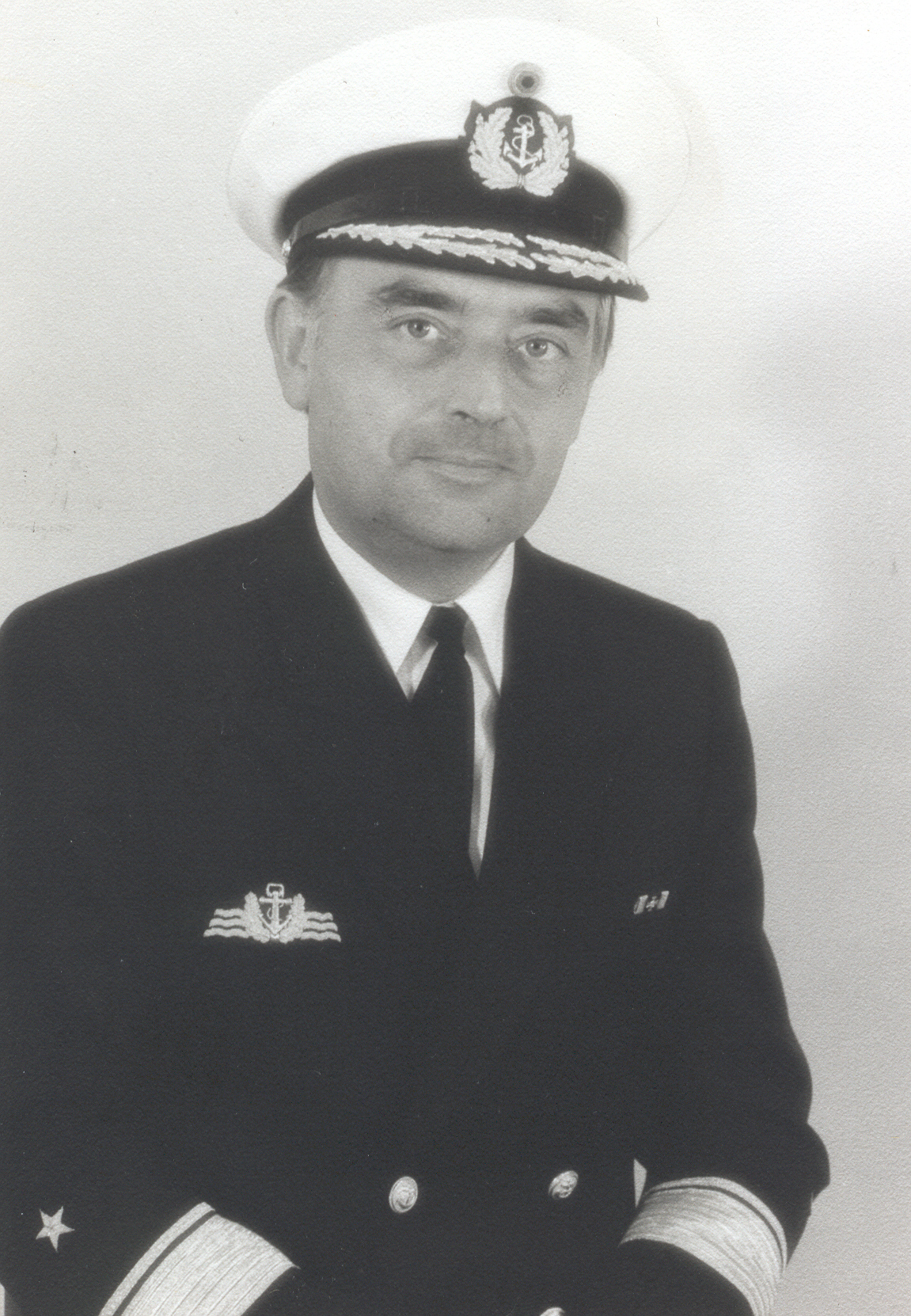 Porträtfotografie von Flottillenadmiral Wolfgang Brost